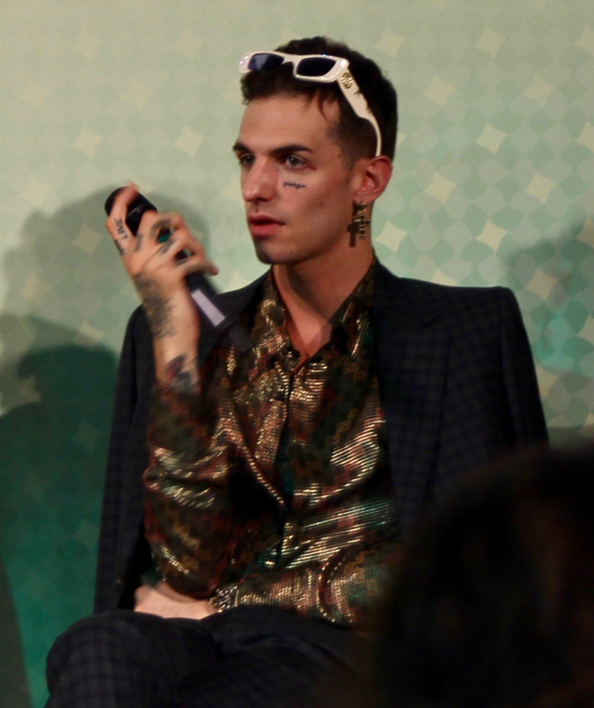 Il cantante italiano Achille Lauro durante il Festival di Venezia 2019